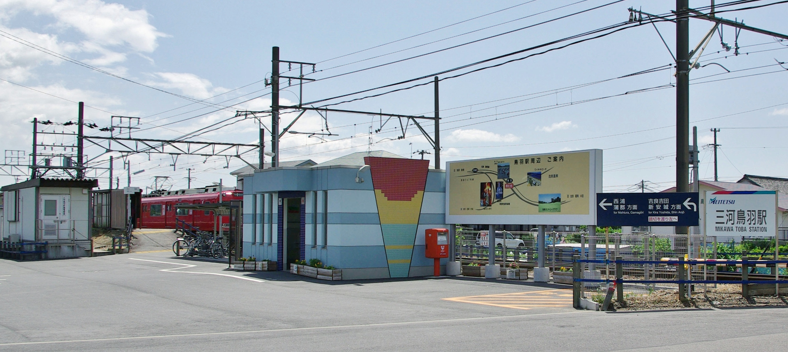 名鉄蒲郡線三河鳥羽駅